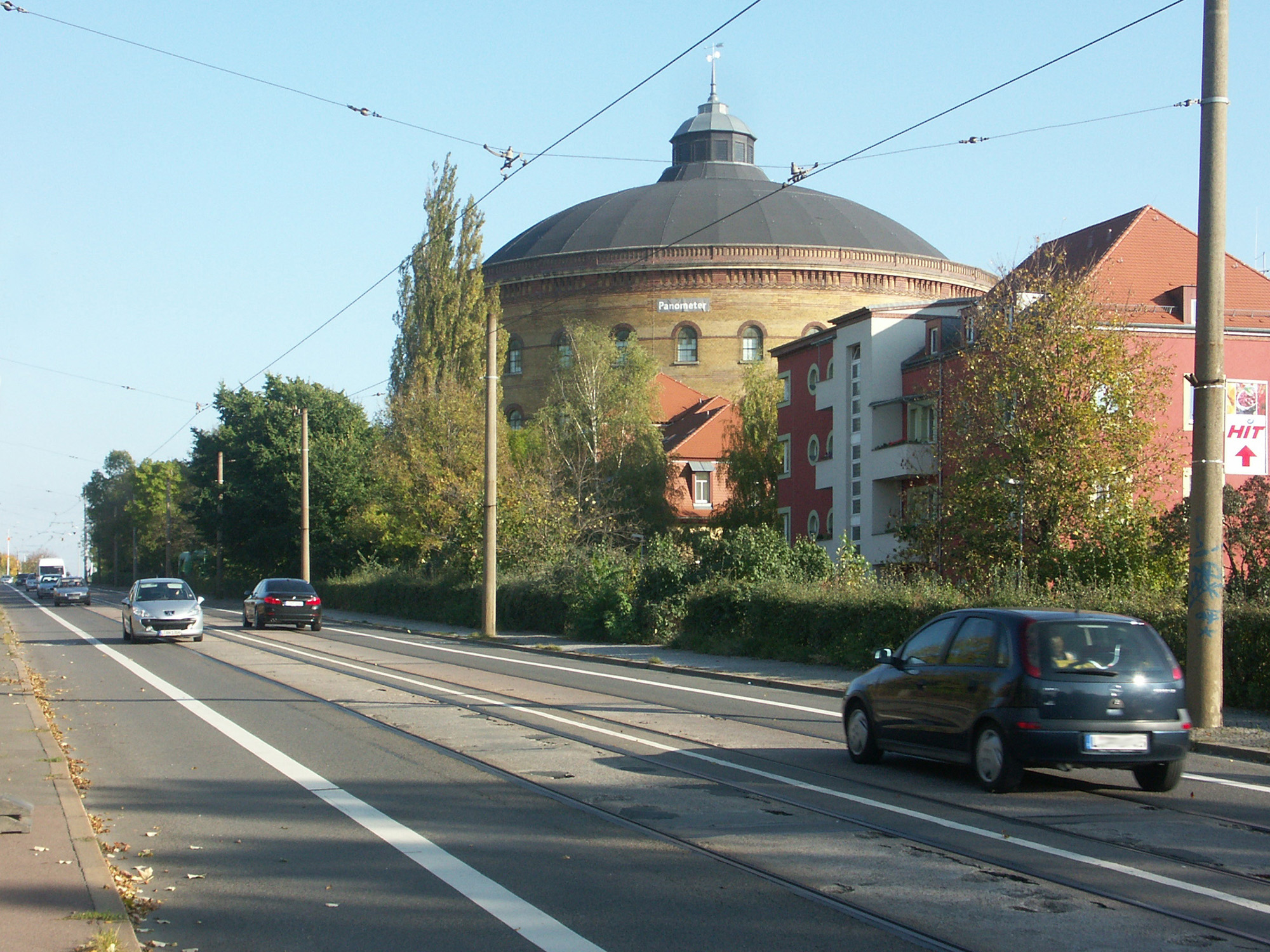 Leipzig, Richard-Lehmann-Straße, Schlachthofberg und Panometer